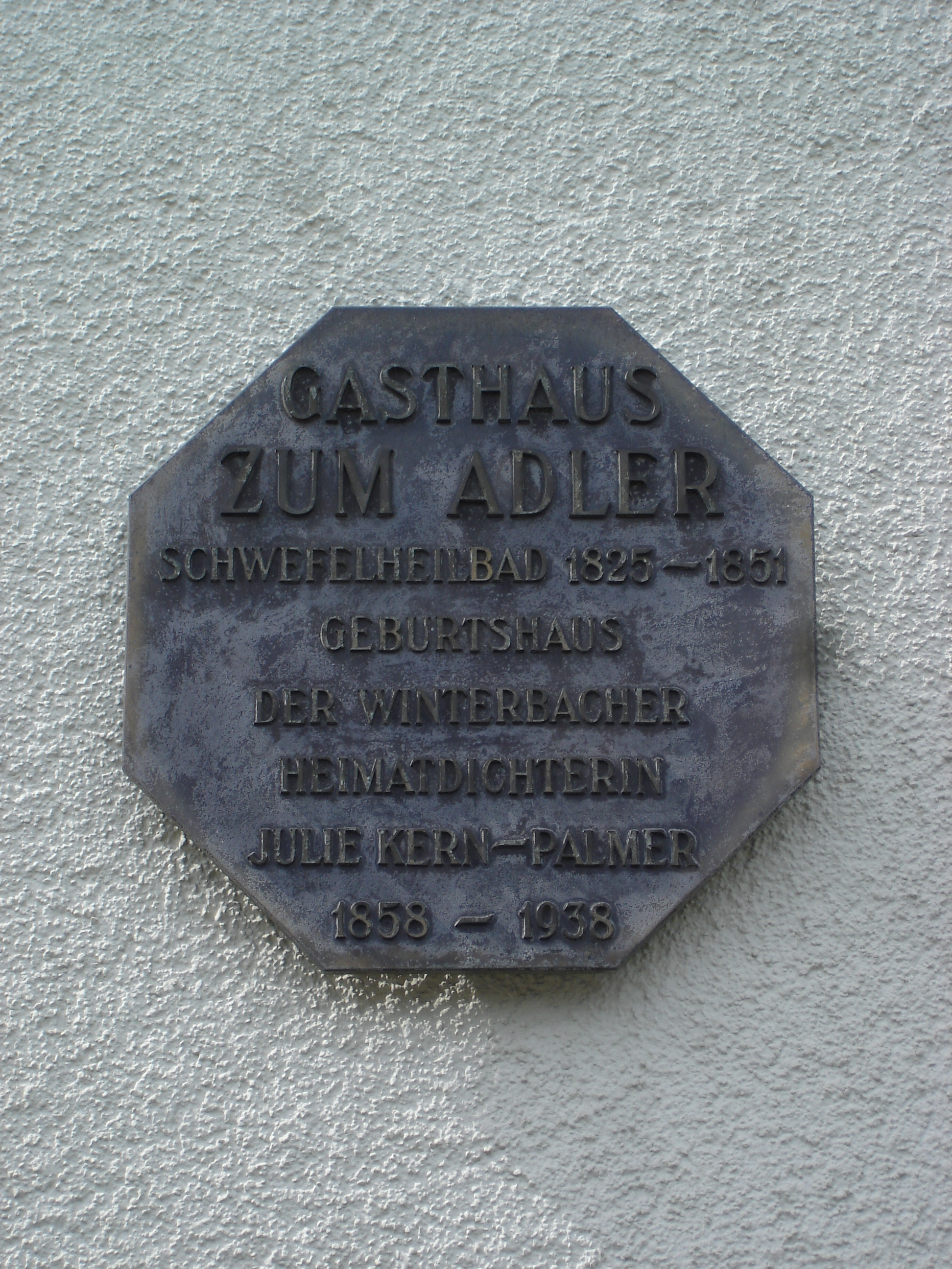 Gedenktafel für Julie Palm an ihrem Geburtshaus in Winterbach